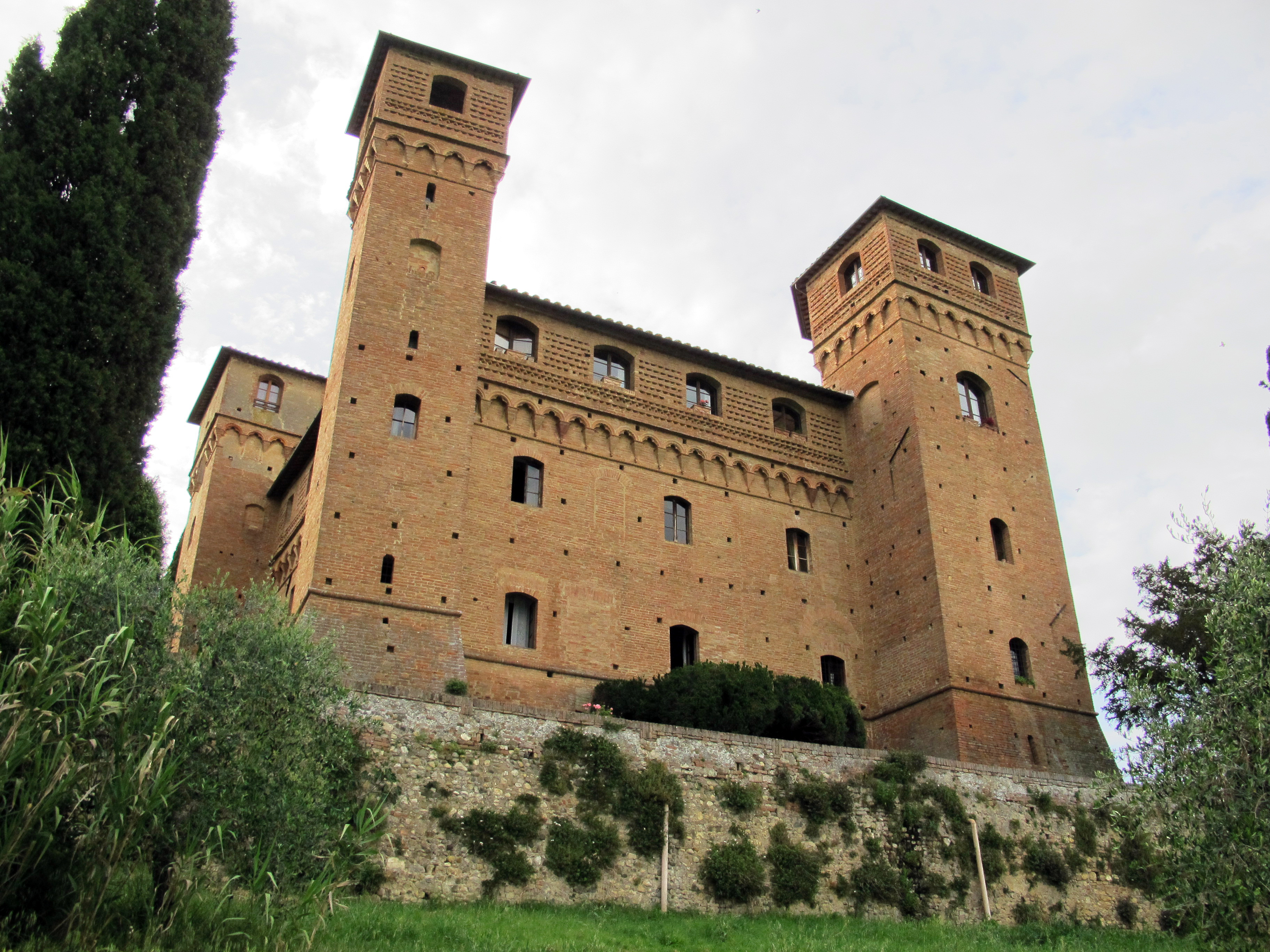 Castello delle Quattro Torra (Siena)